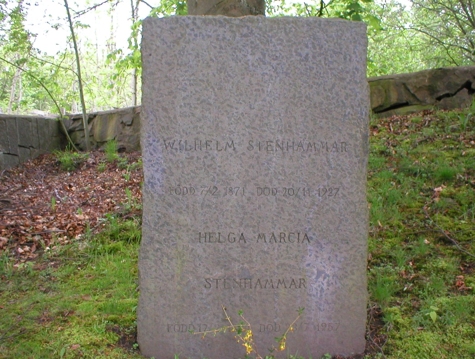 Foto av Wilhelm Stenhammars gravsten på Mariebergskyrkogården, Majorna, Göteborg, taget av Per Johansson 2005.